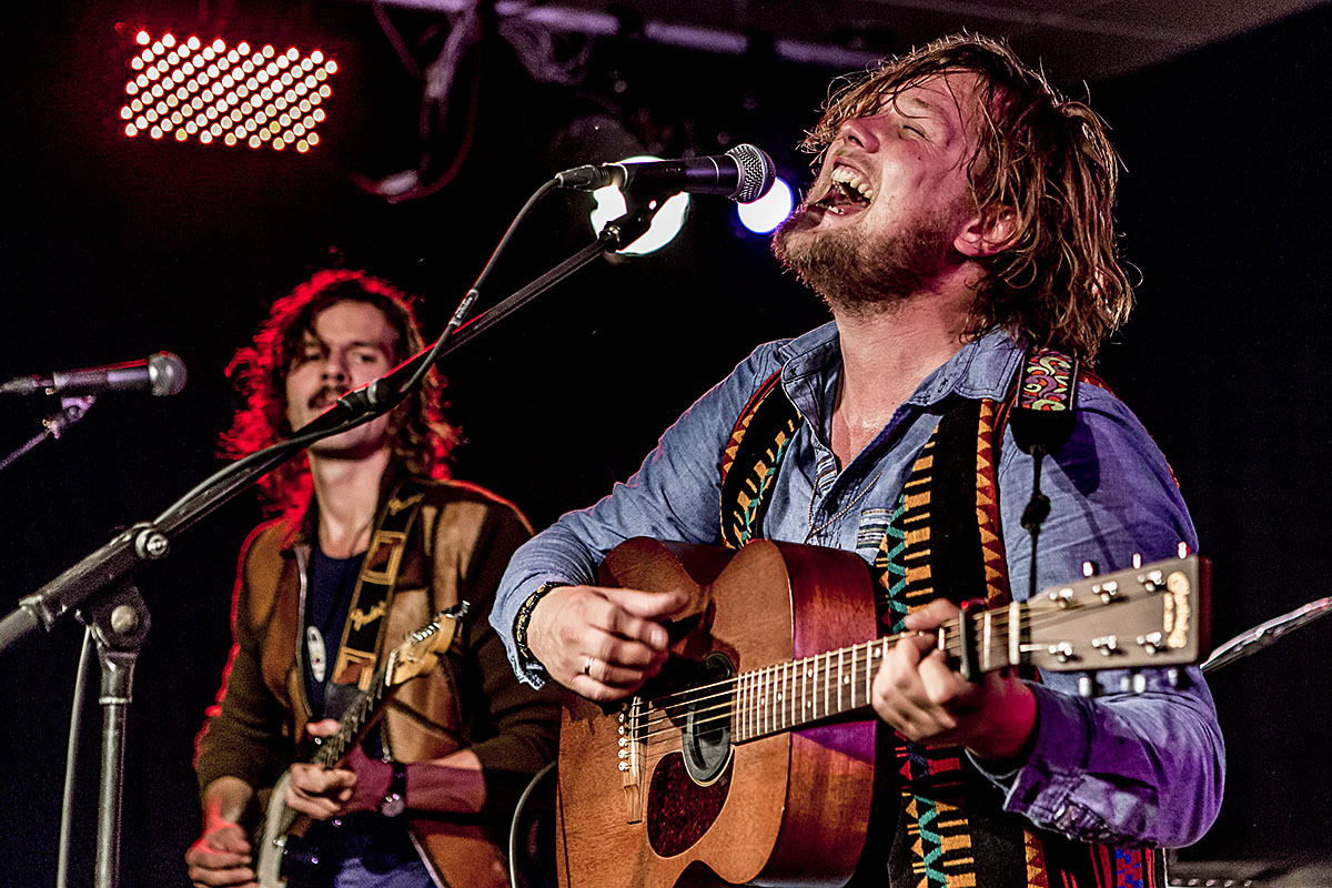 Bandet Hymns from Nineveh (med forsanger Jonas Petersen til højre) spiller på Kulturstationen i Vanløse den 27. september 2013